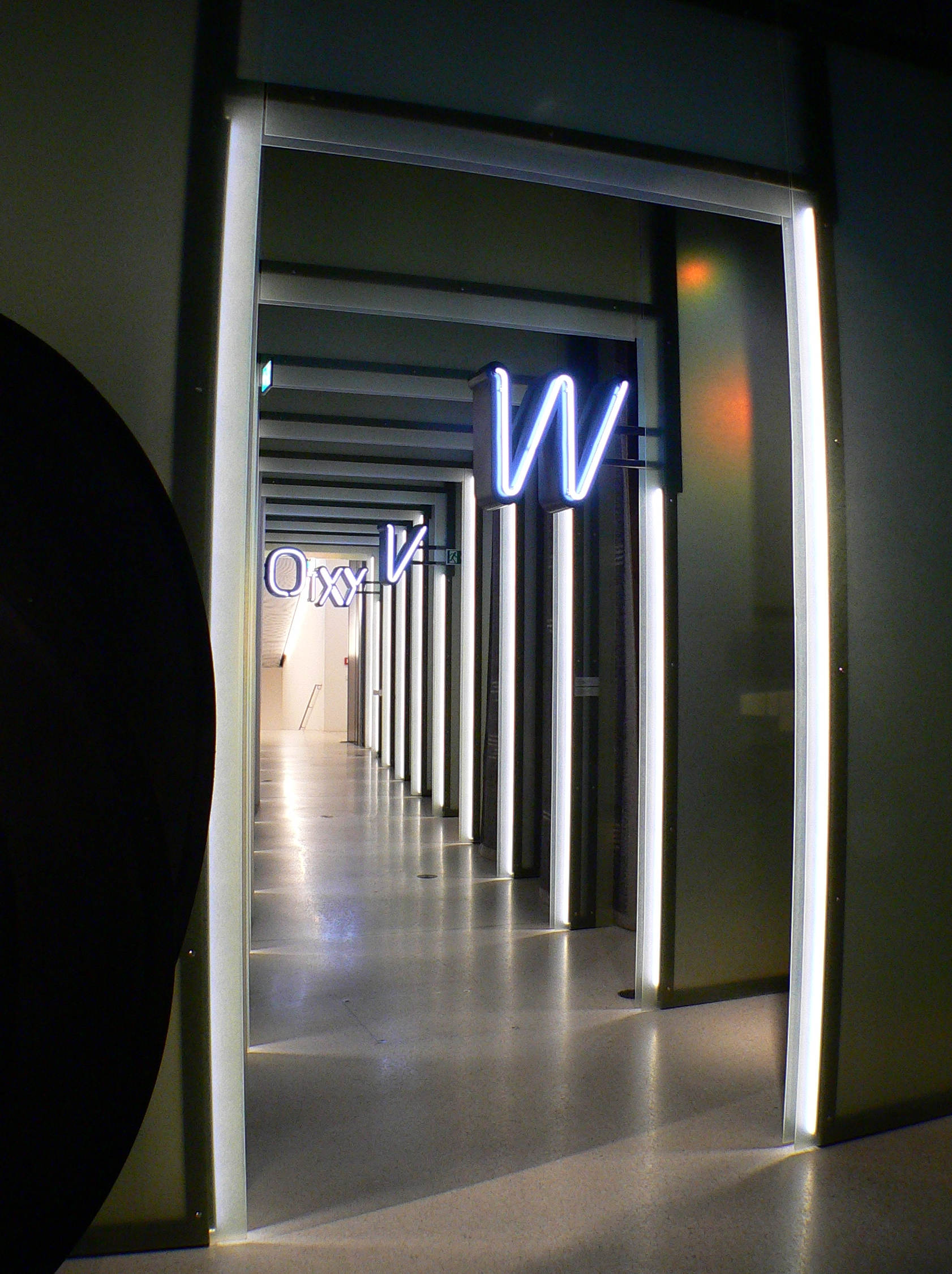 Themengang im Museum GrimmWelt in Kassel, Deutschland